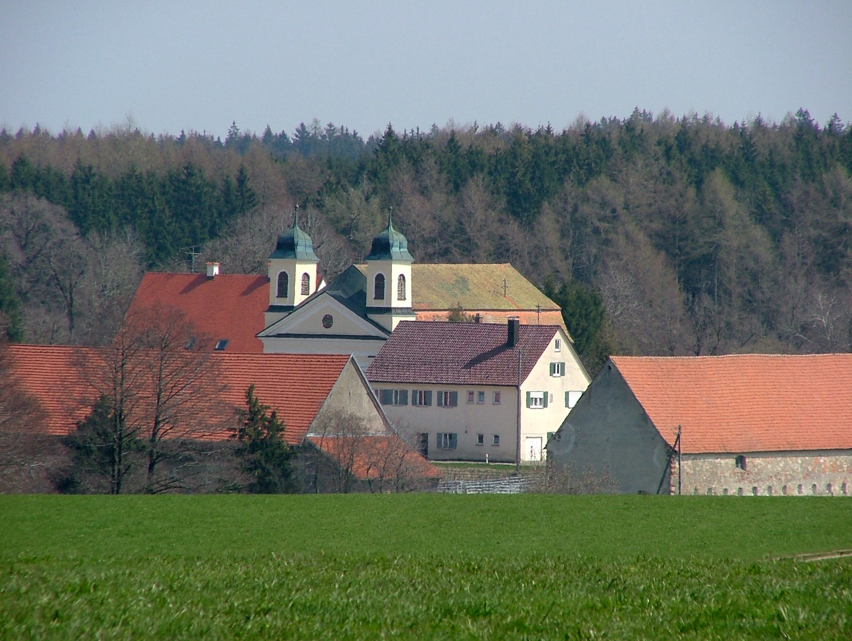 Treherz